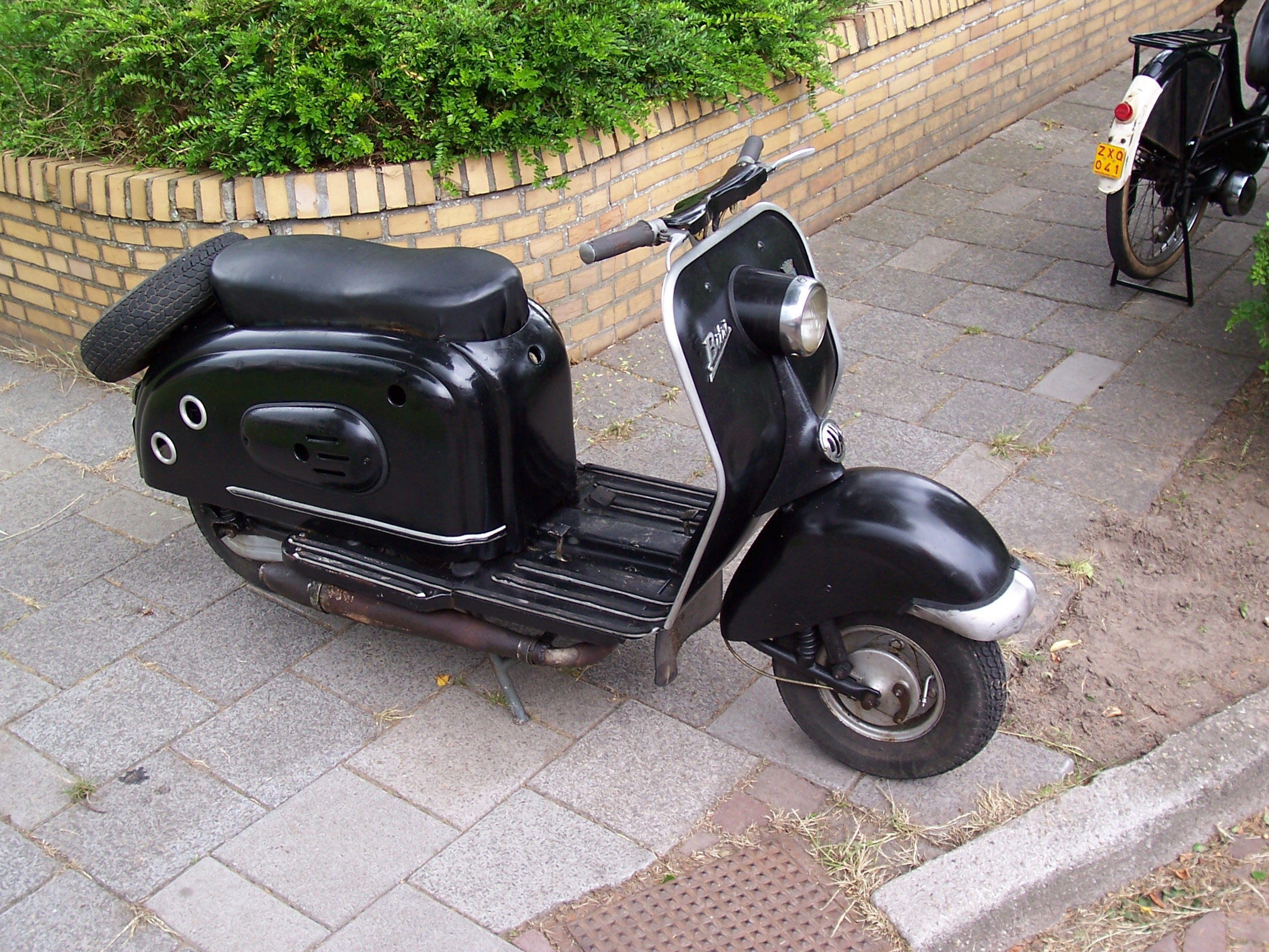 De laatste Bitri die in 1973 de fabriek te Dokkum verliet, nu nog in leven